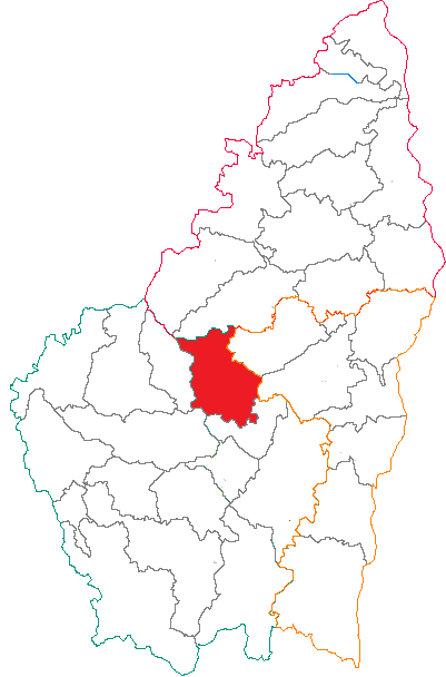 Situation du canton dans le département de l'Ardèche (France)